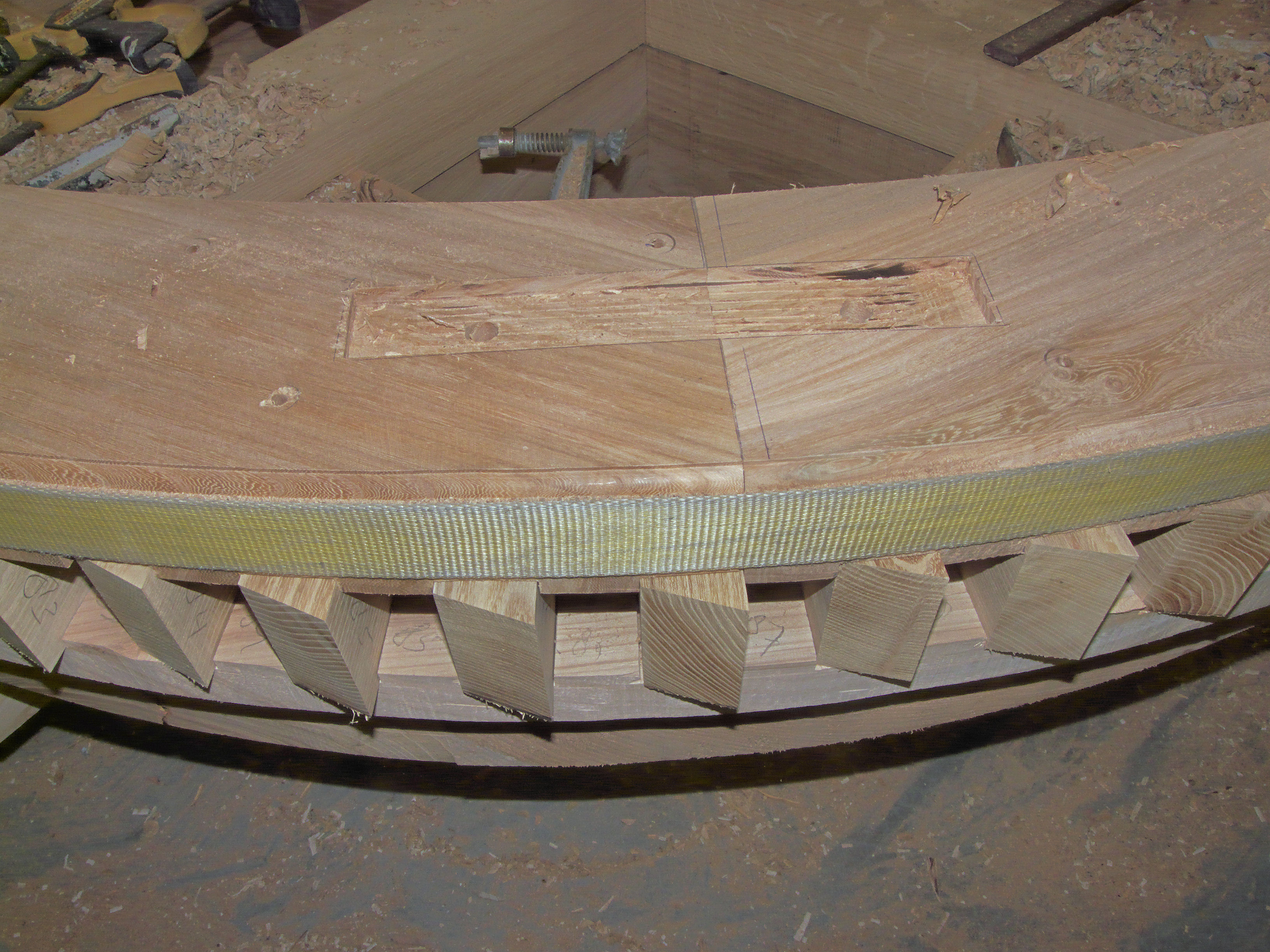 Molen De Hoop, Oldebroek, spoorwiel met losse dammen en iepen velgen